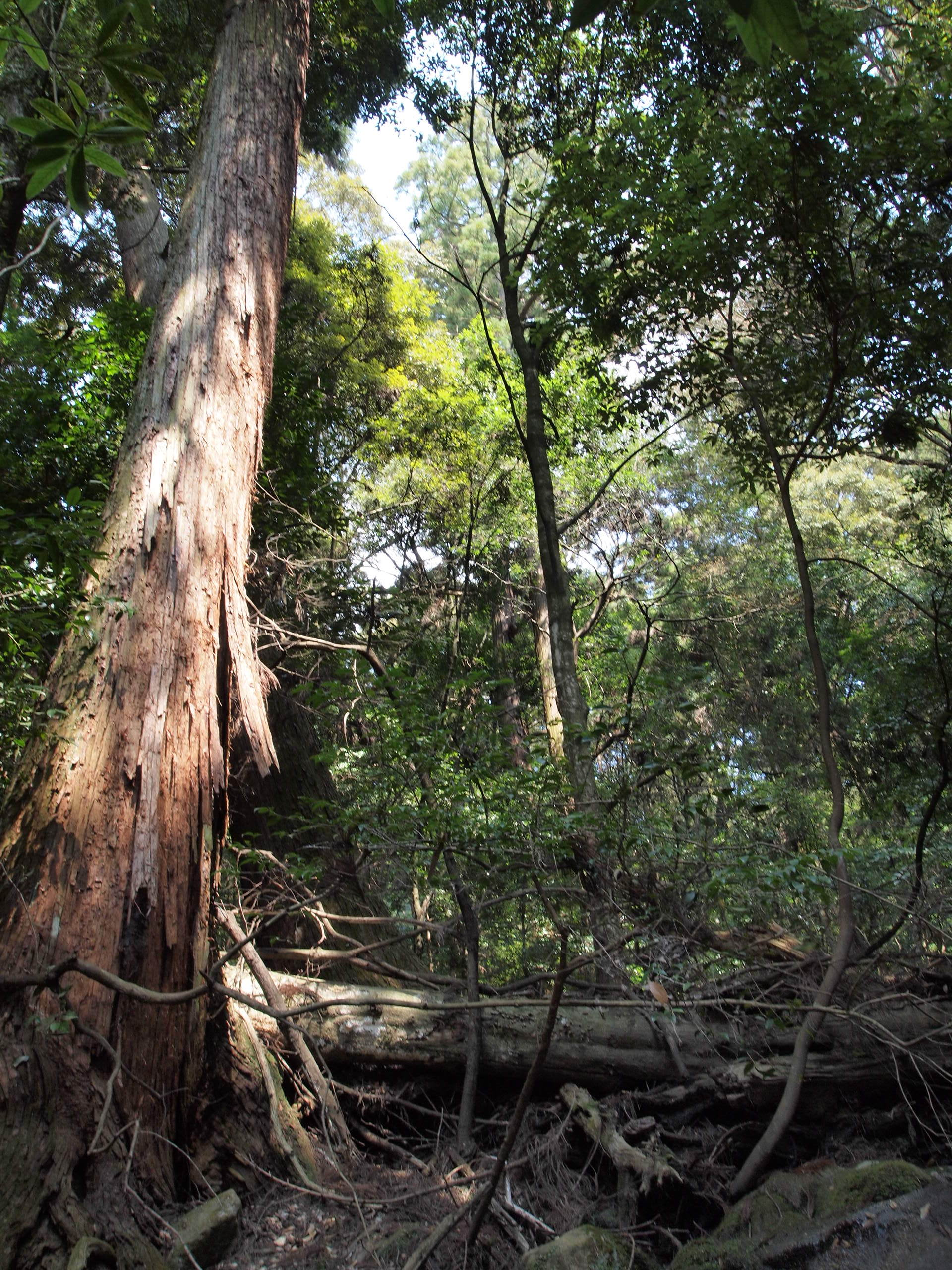 春日山原始林。2011年3月31日撮影。 撮影者のブログはこちら。